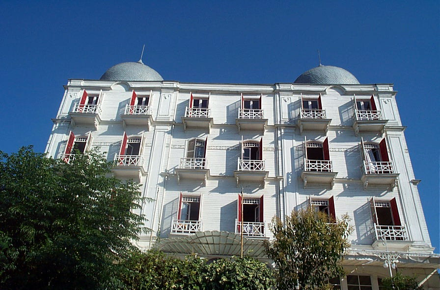 Büyükada, Princess Islands